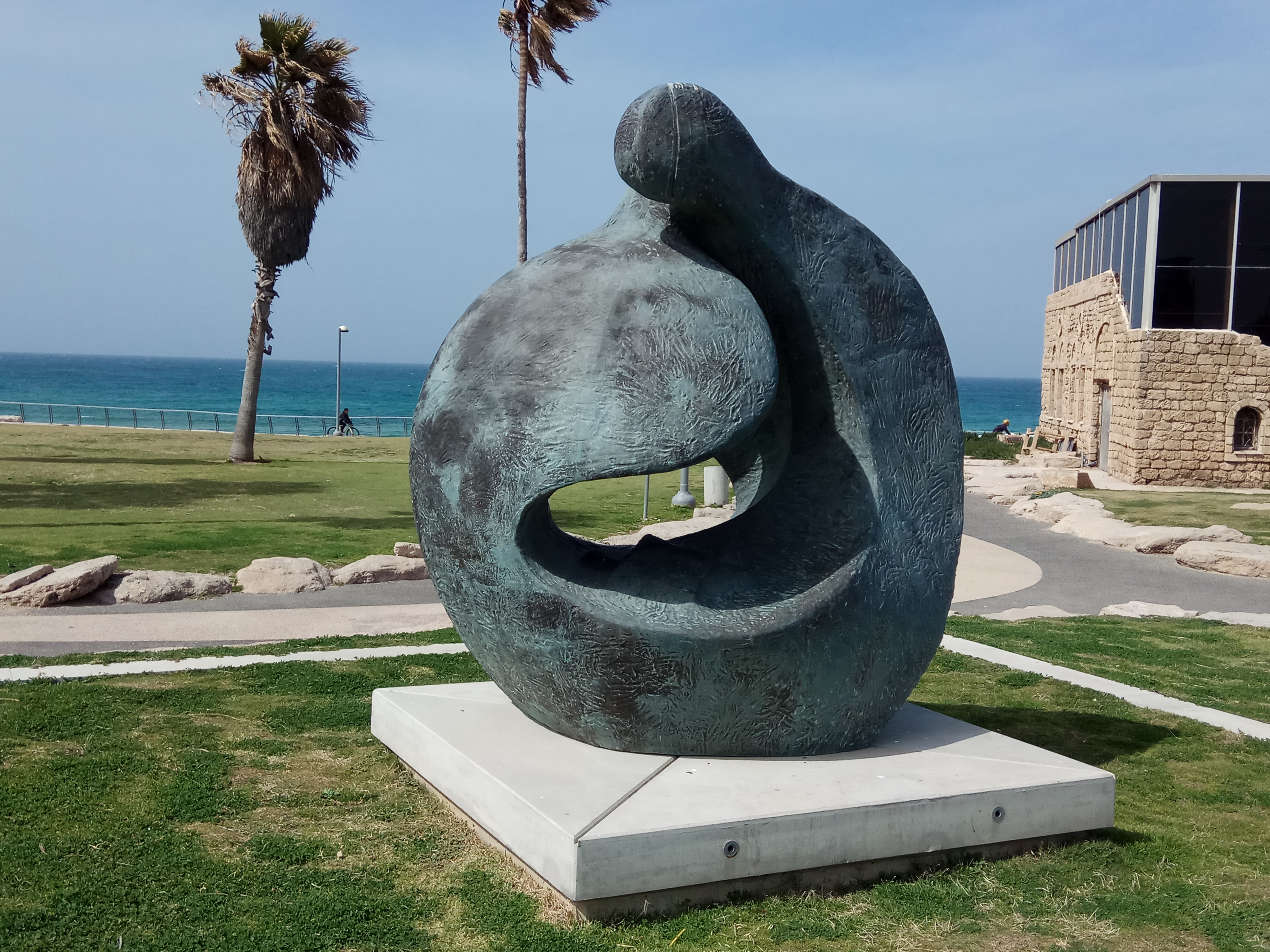 אנדרטת ההצלה בפארק צ'רלס קלור בתל אביב לזכר הצלת יהודי בולגיה בשואה. הפסל הוא צ'בטקוב מומצ'יל